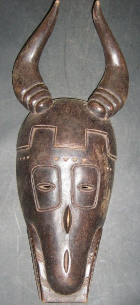 masque gouro de cote d'ivoire